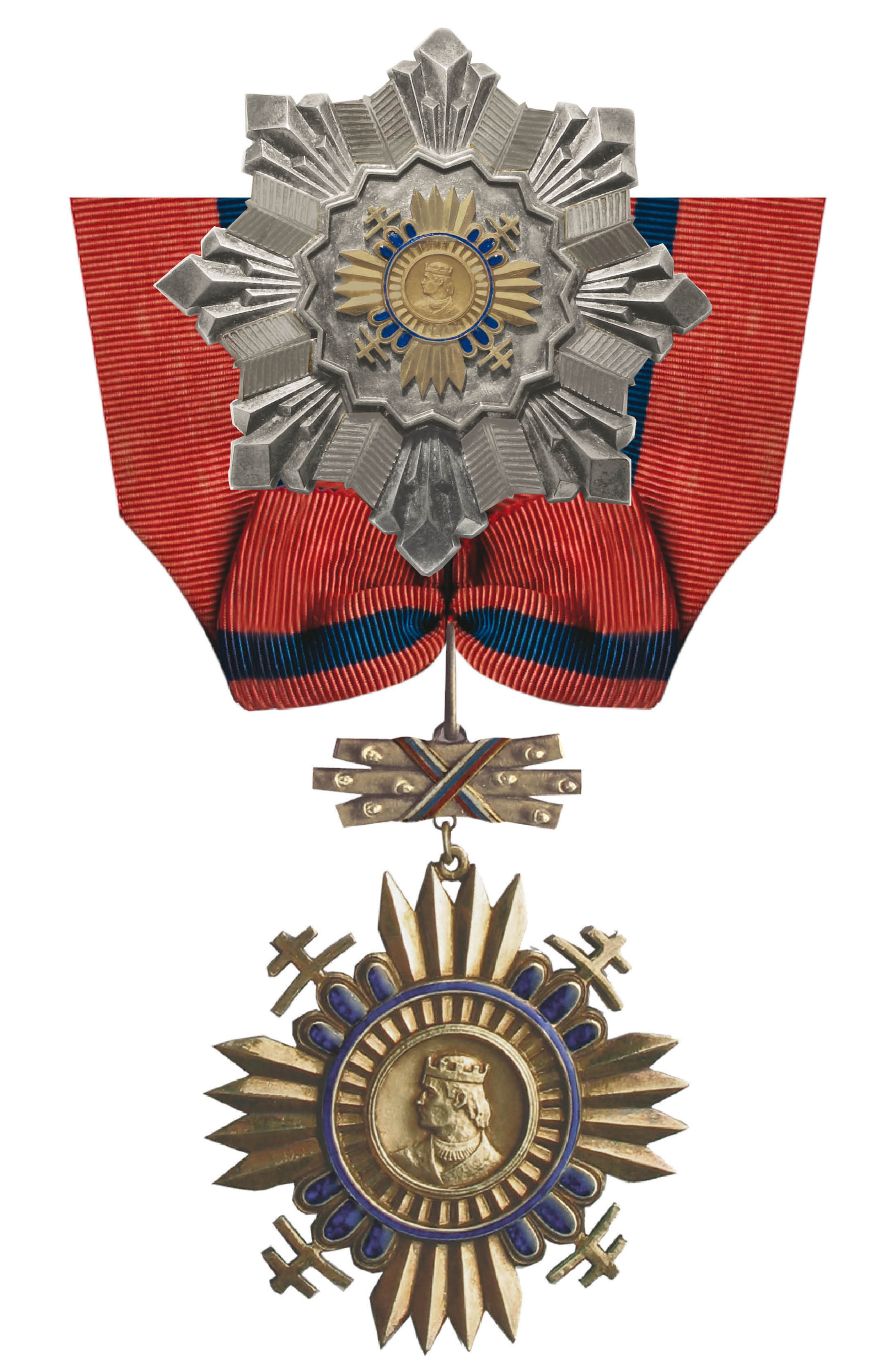 Veľkodôstojnícky kríž s časťou strednej stuhy Radu kniežaťa Pribinu a hviezdou 2. triedy vojnovej Slovenskej republiky 1940-45